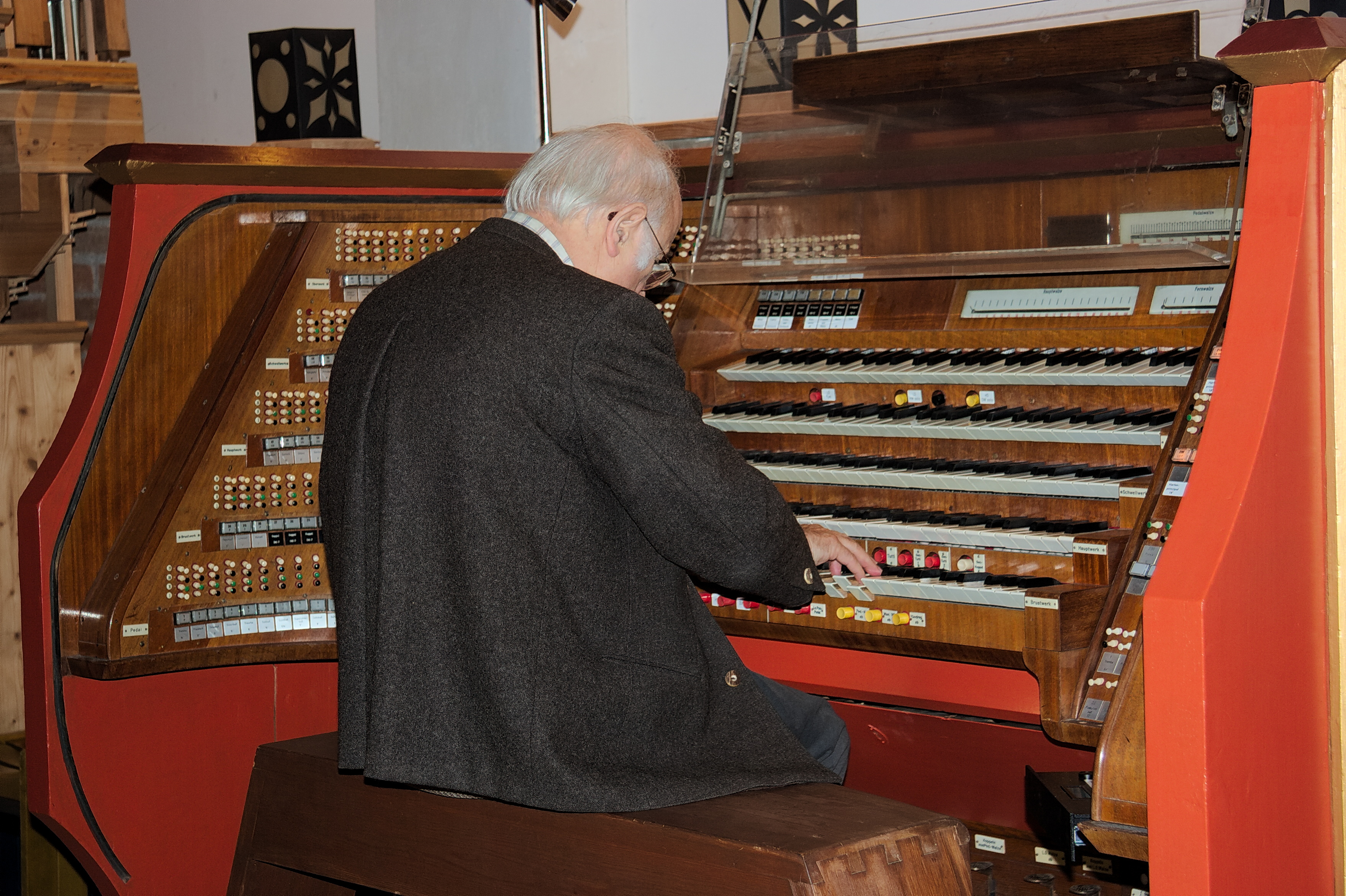 Sixtus Lampl spielt am historischen Zentralorgelspieltisch von St. Lorenz, Nürnberg (Steinmeyer 1936-1937) im Orgelzentrum Valley